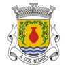 Brasão da freguesia da A-dos-Negros